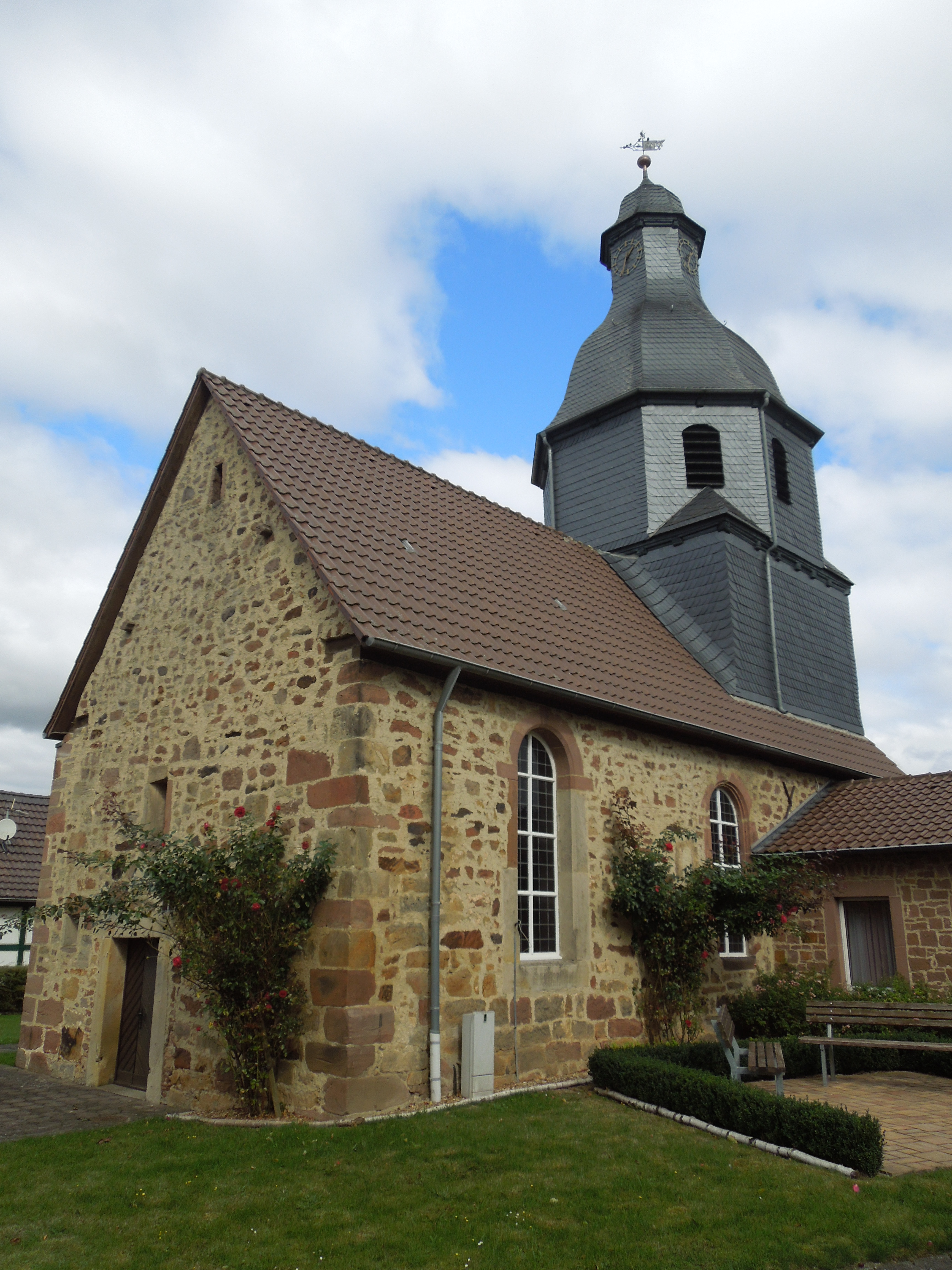 Die Kirche in Trockenerfurth, gesehen von Südwesten